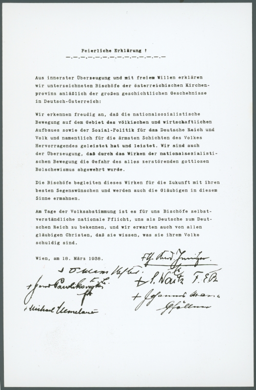 Bekennerschreiben der katholischen Bischöfe Österreichs zum "Deutschen Reich" im Vorfeld der Volksabstimmung am 10. April 1938.